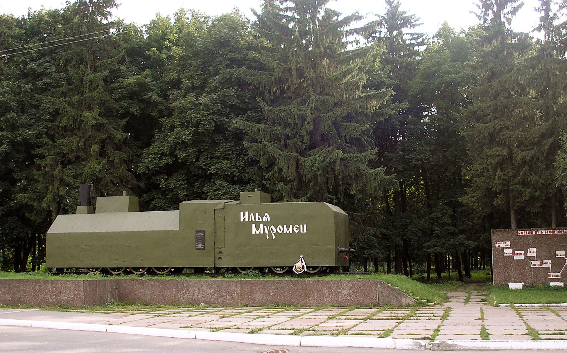 Бронепоезд "Илья Муромец" (архитектор Н.А.Беспалов), г.Муром